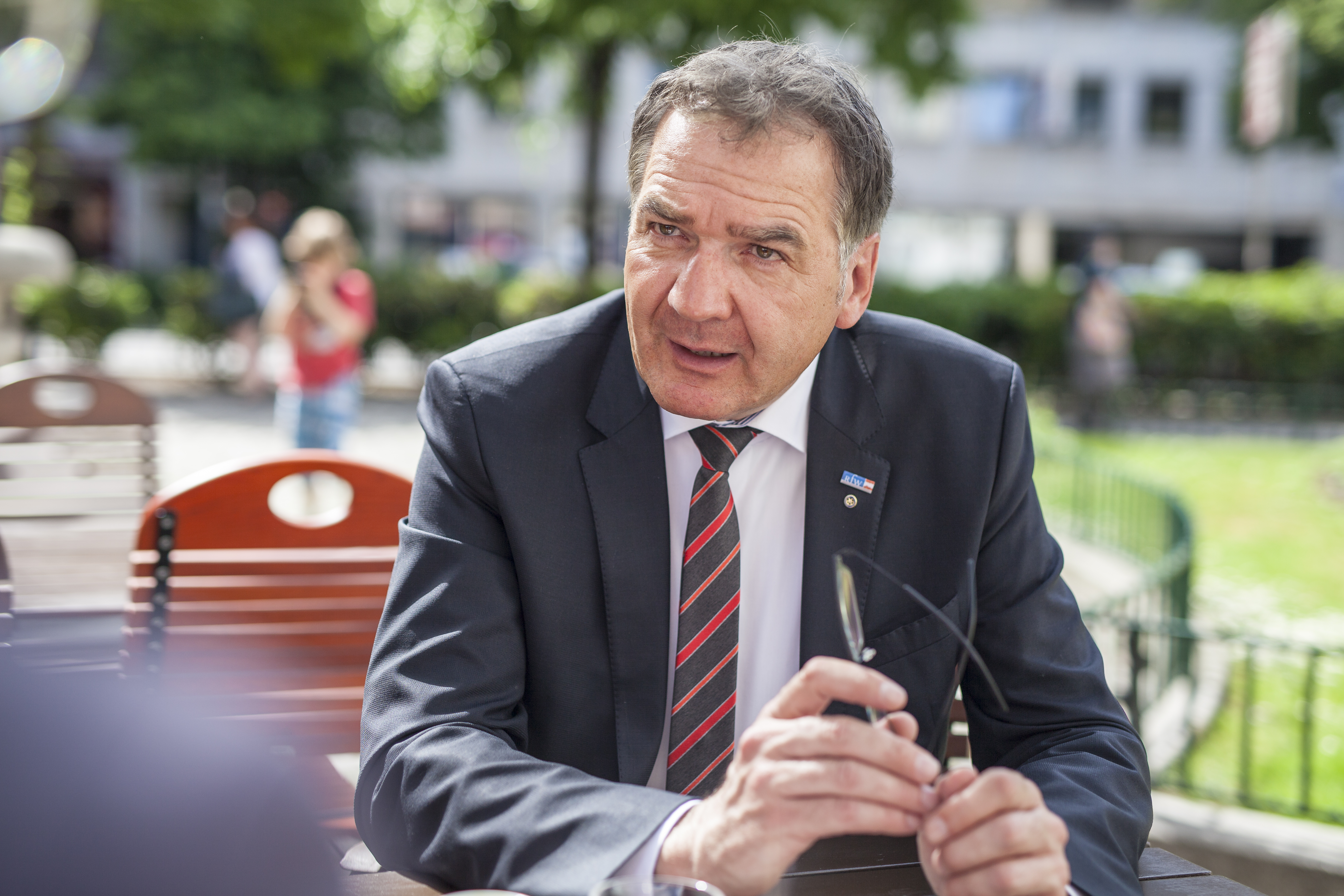 KommR Matthias Krenn